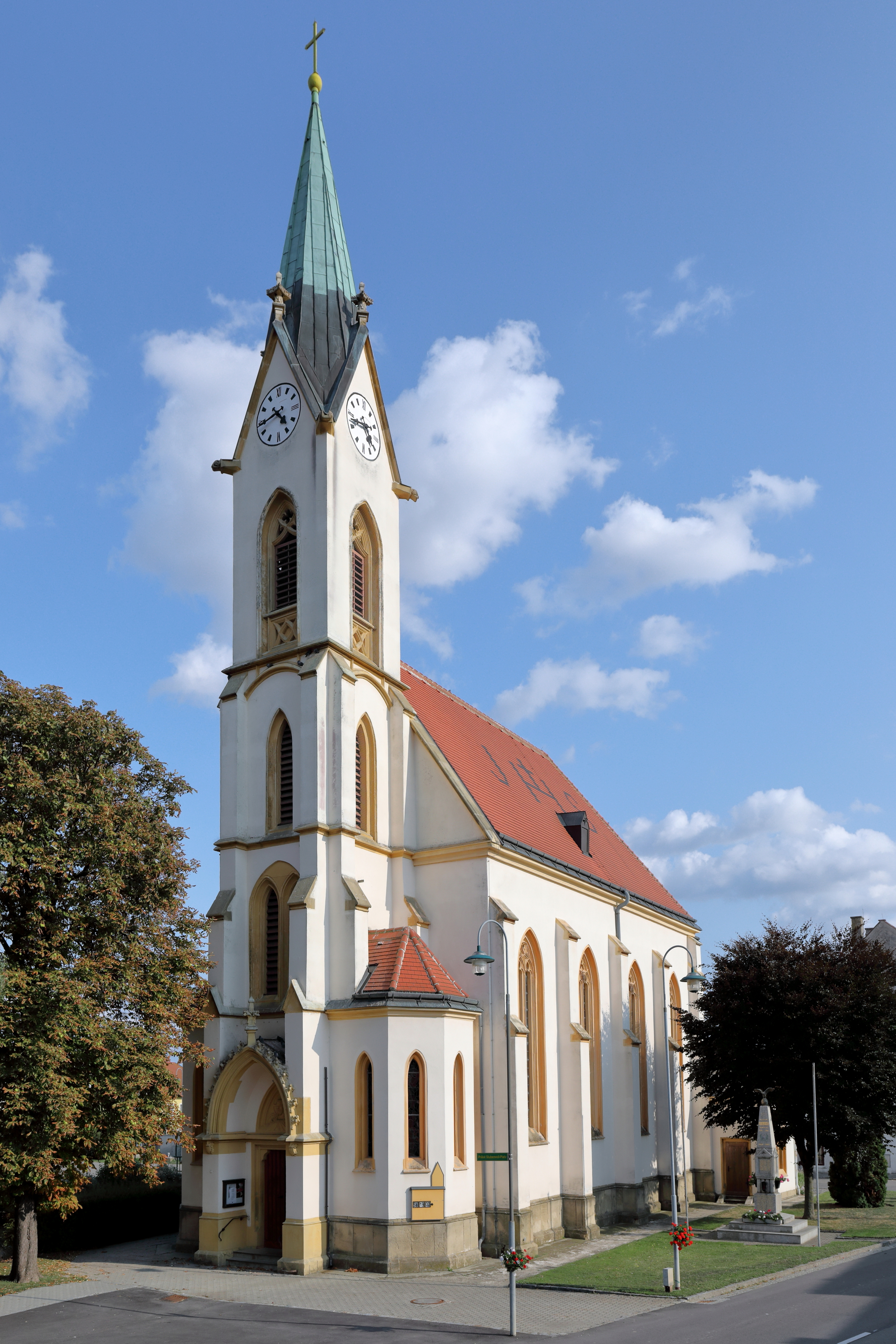 Nordwestansicht der röm.-kath. Pfarrkirche hl. Rochus in Siebenhirten, ein Ortsteil der niederösterreichischen Bezirkshauptstadt Mistelbach. Die neugotische Kirche mit vorgestelltem Fassadenturm wurde 1868 nach einem Entwurf von Hieronymus Schaller erbaut.